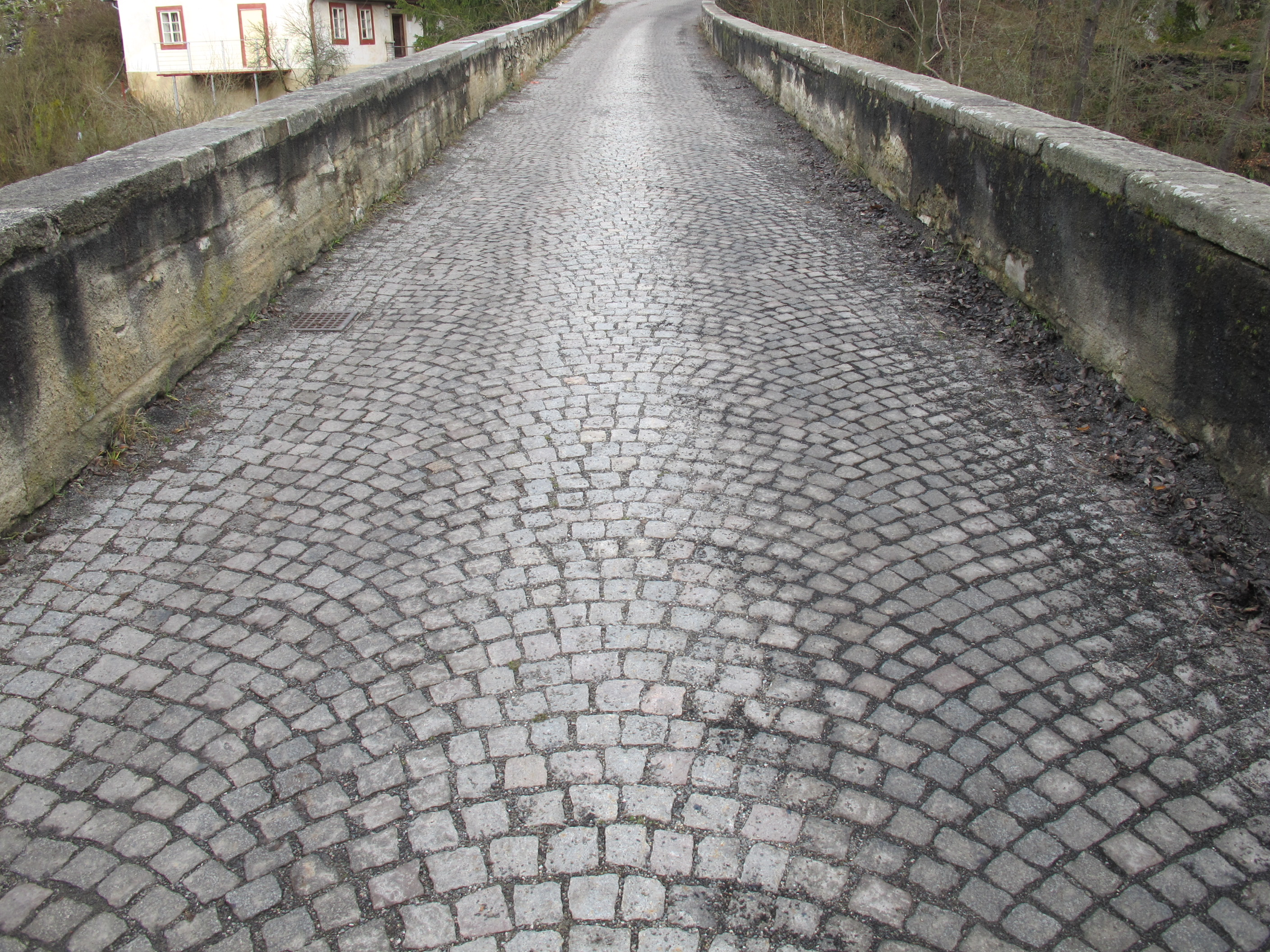 Silniční most přes Střelu, Rabštejn nad Střelou